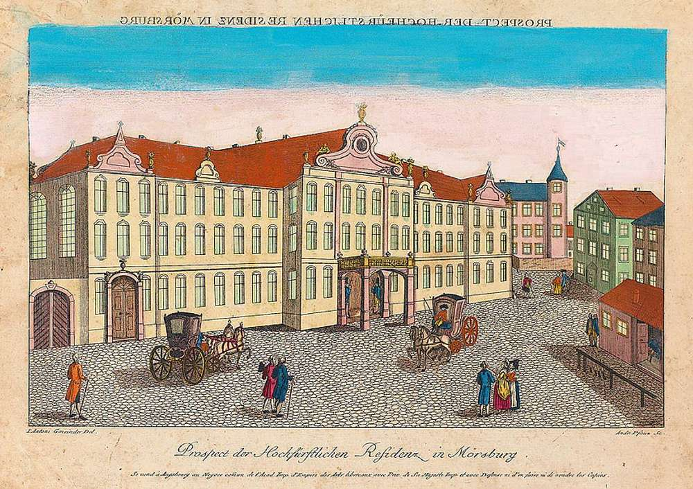 Prospect der Hochfürstlichen Residenz in Mörsburg. Meersburg, Neues Schloss, Guckkastenbild, Augsburg um 1780; 25,5 x 40,5 cm